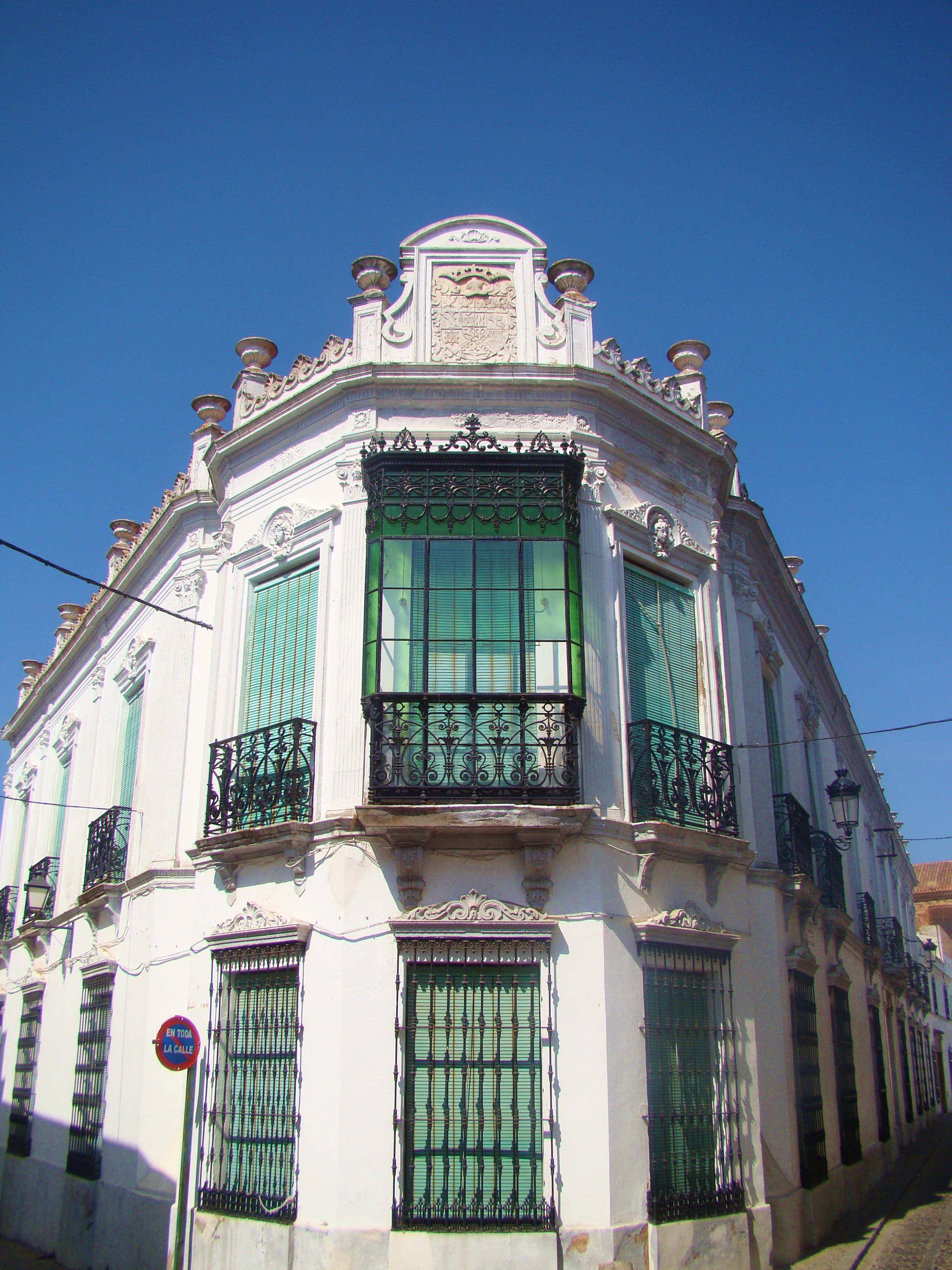 Palacio de los Marqueses de Torrepilares